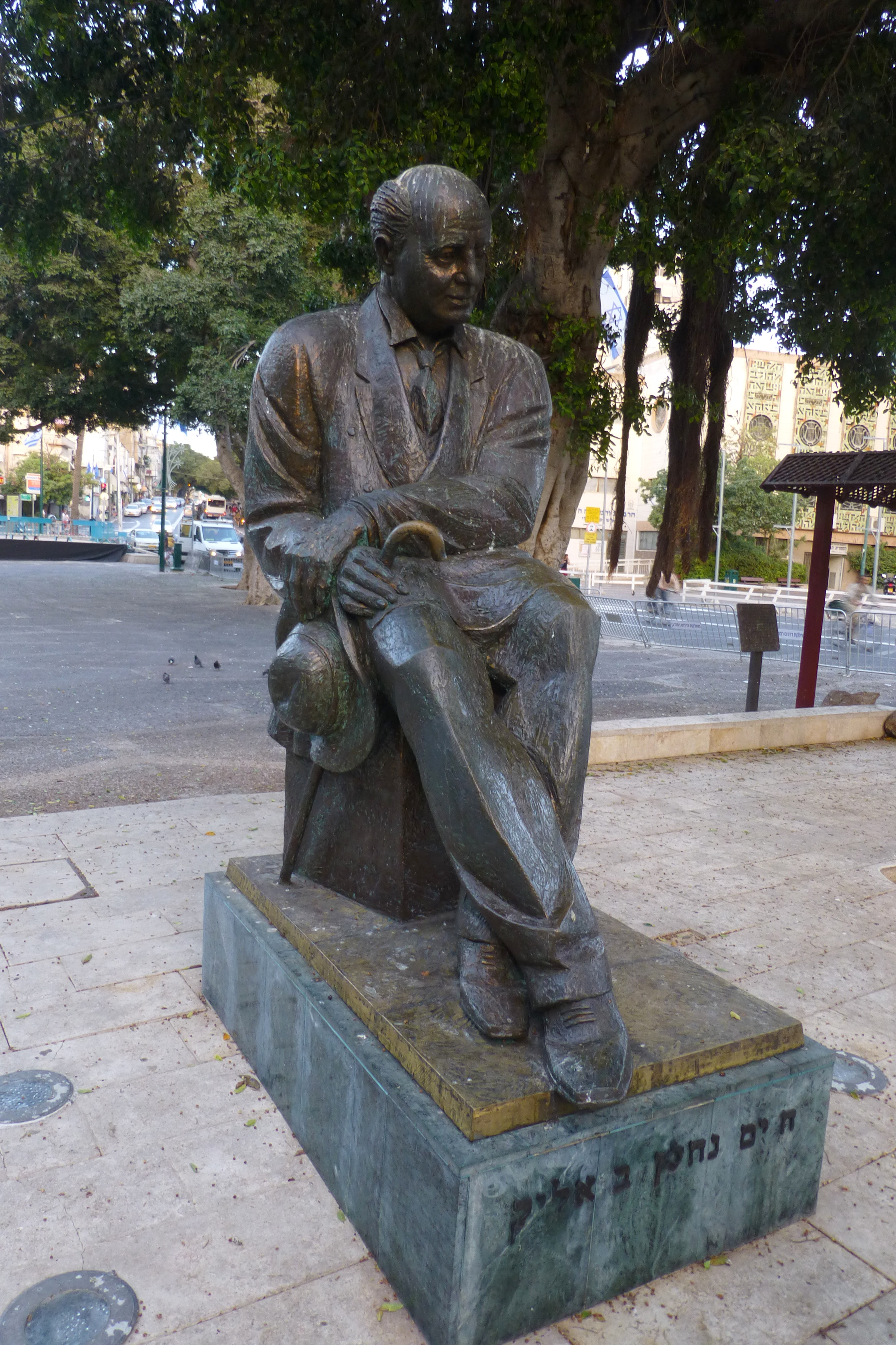 קולנוע אורדע - מבנה בסגנון הבינלאומי בו נפתח בית הקולנוע הראשון ברמת גן. בנייתו החלה ב-1936 ובאפריל 1937 פתח את שעריו. תכולתו עמדה על כ-800 מושבים ונערכו בו גם מופעים. ב-1990 חדל לשמש כבית קולנוע וכיום שוכן במבנה סניף של סופרפארם.